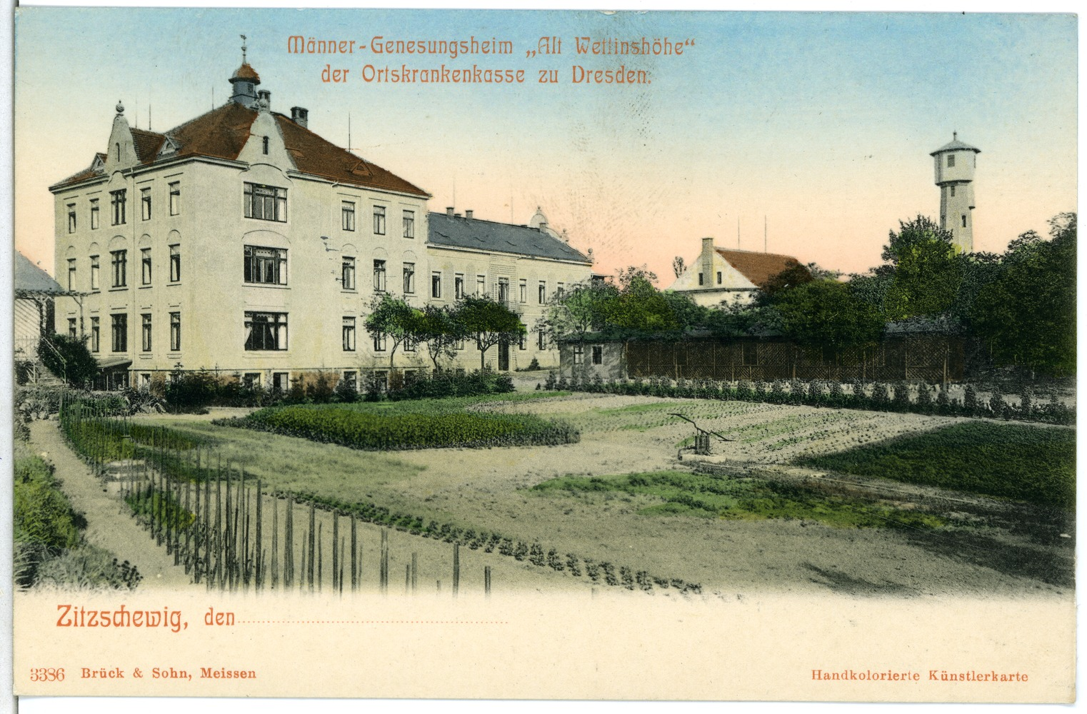 Zitzschewig; Männer-Genesungsheim Alt-Wettinshöhe This postcard is from publisher Brück & Sohn in Meißen ( postcard has a unique number 03386 and is available in a higher resolution at the publisher. This images was uploaded in a cooperation project between Wikipedians and the publisher.